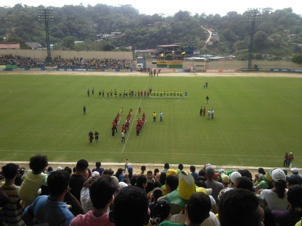 Estadio Ramón Hernández, El Vigía, Estado Mérida. Venezuela.